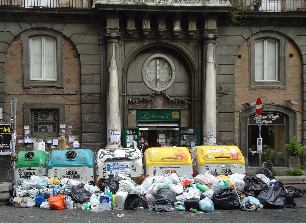 Containers voor gescheiden afval in Napels, Italië